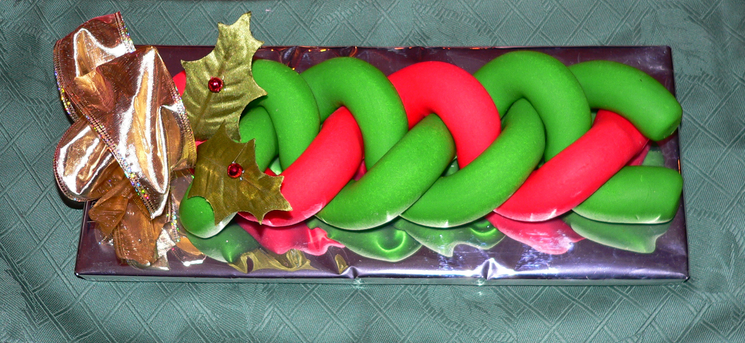 Trenza de maná del Perú con decorado navideño